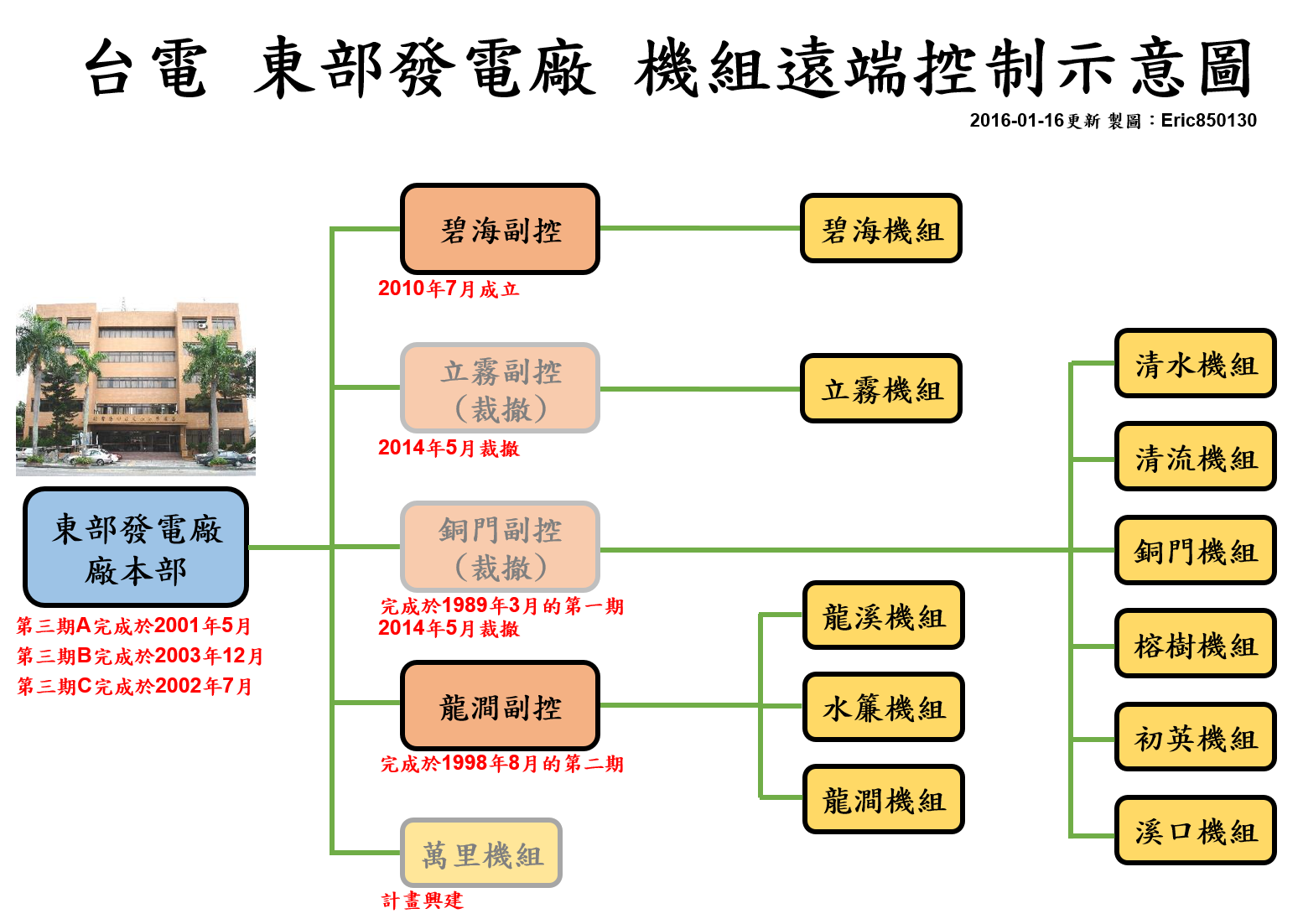 臺灣電力公司東部發電廠機組遠端控制示意圖。